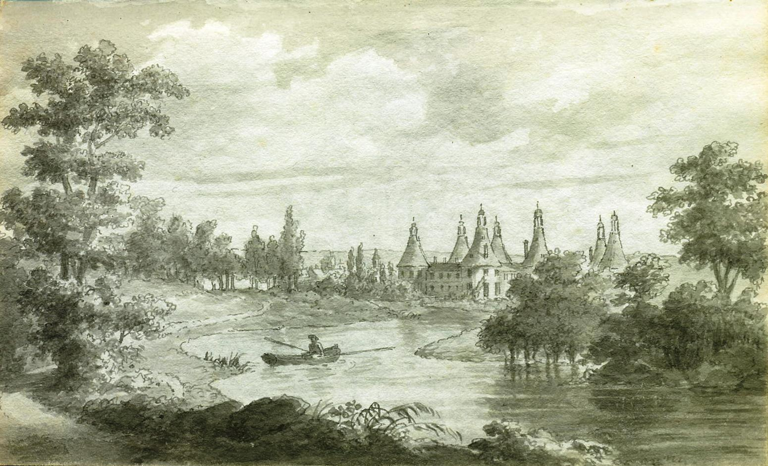 Château de Saint-Fargeau, dessin et lavis